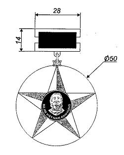 Huy hiệu Bà mẹ Việt Nam Anh hùng